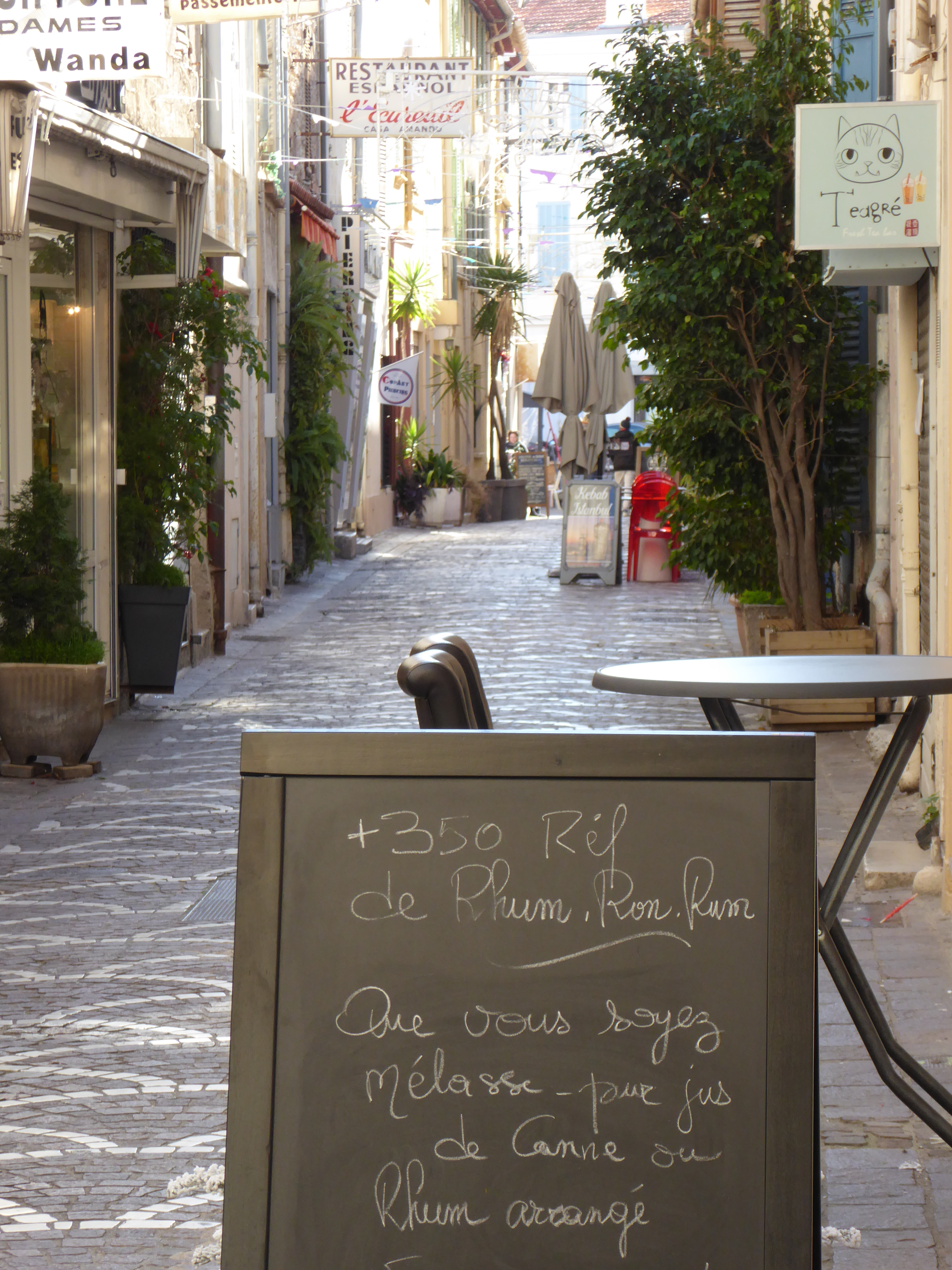 streets in Antibes